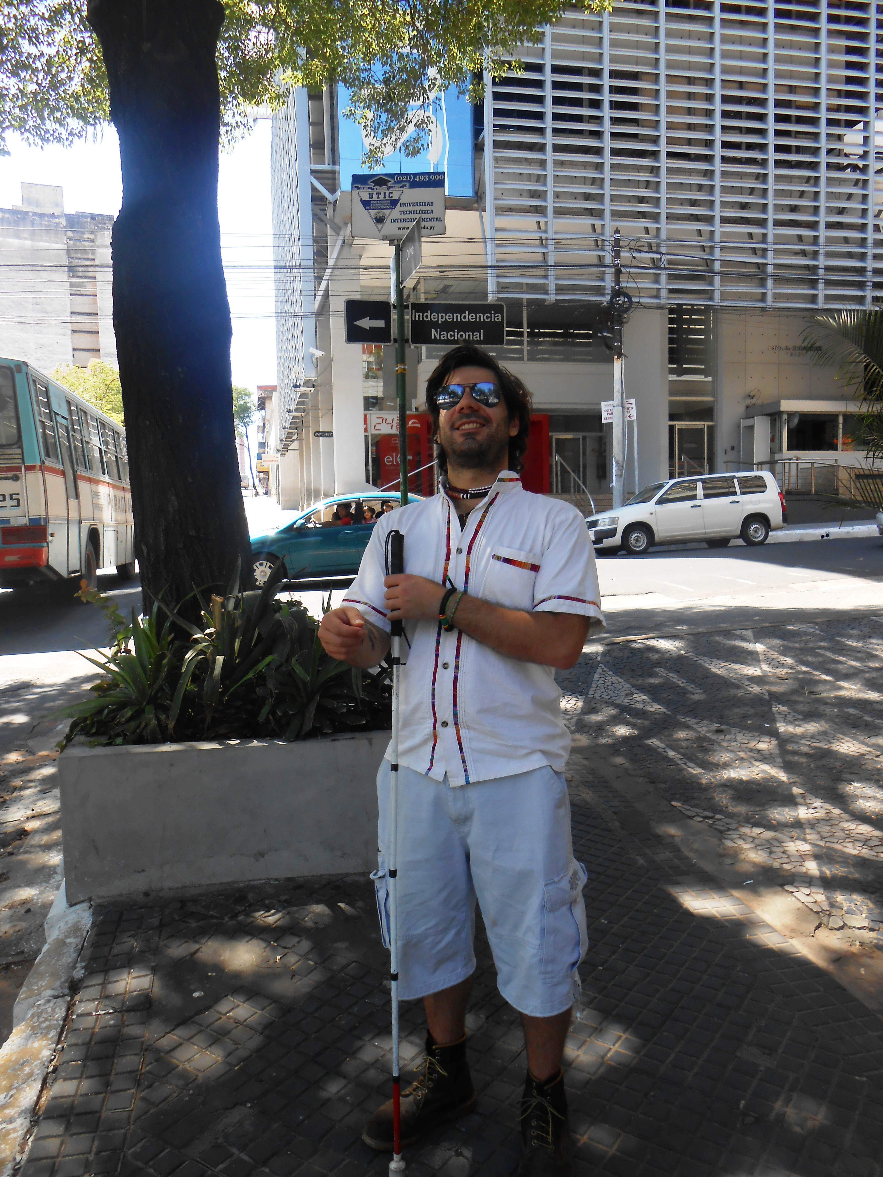 Avañe'ẽ: Alessandro Bordini, Paraguaýpe